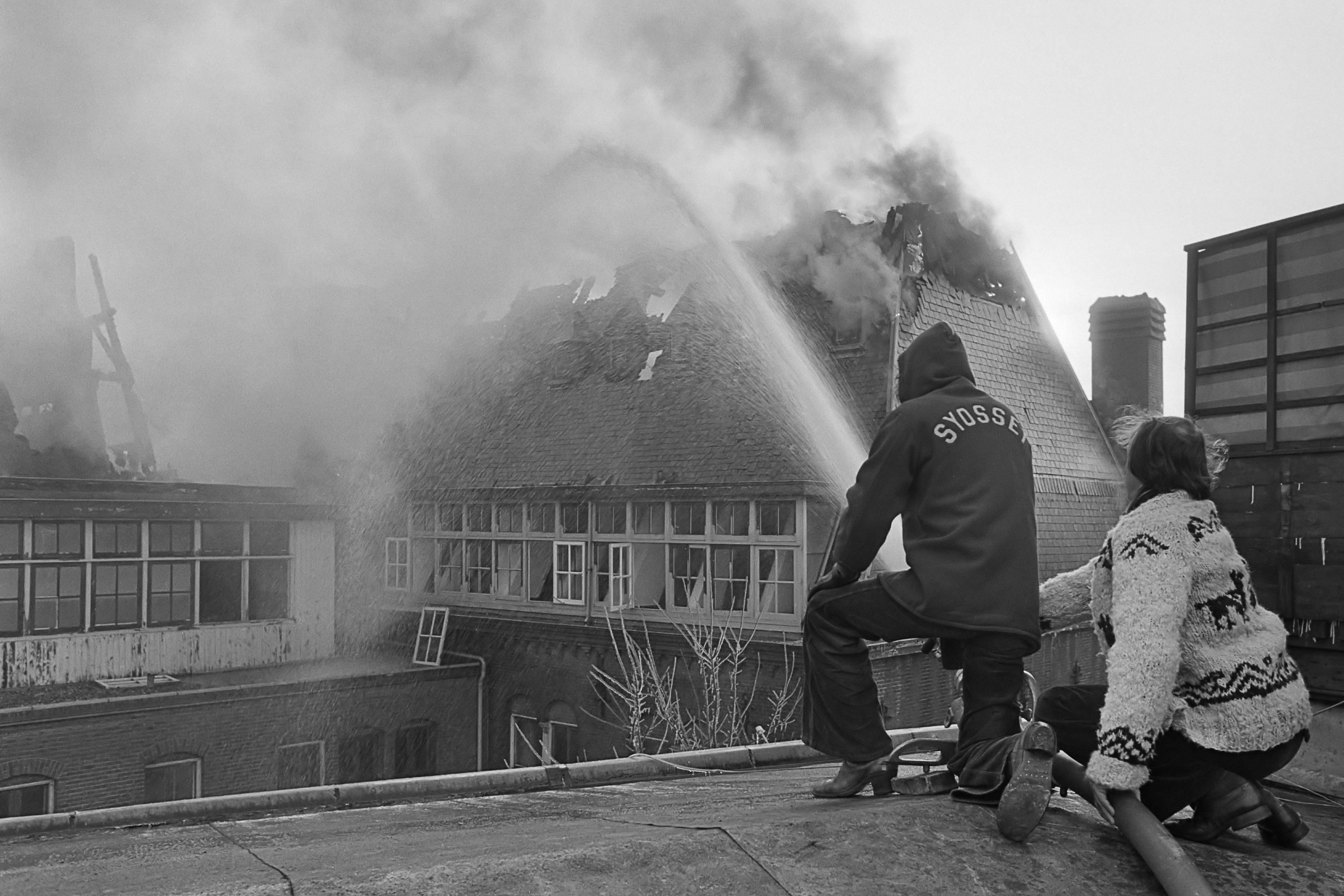 Van Nispenhuis aan de Stadhouderskade in Amsterdam uitgebrand; buurtbewoners helpen blussen 1 februari 1977